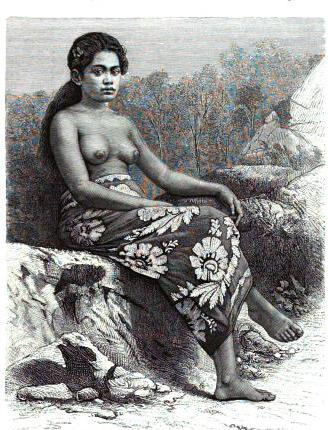 Jeune fille de l'ile Rimatara. Dessin de E. Ronjat, d'après une photographie.